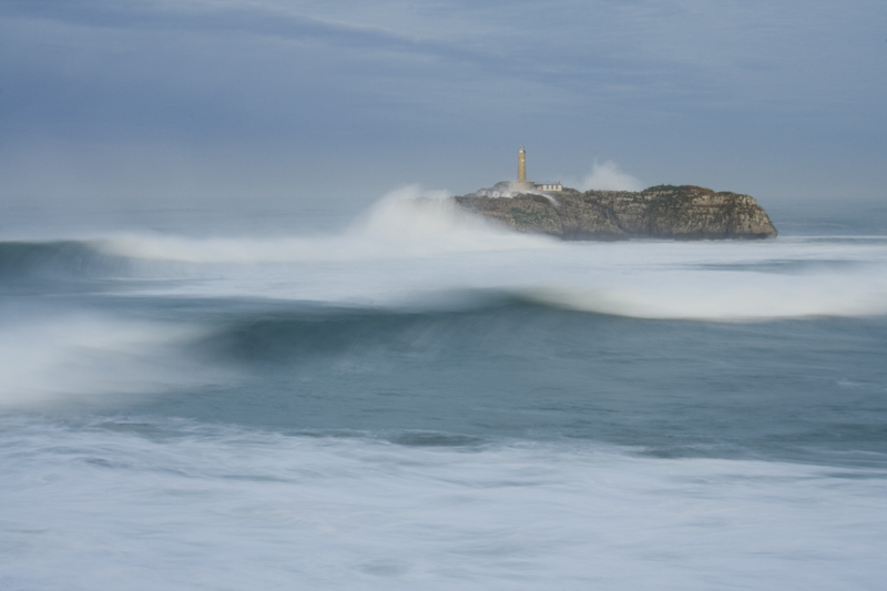 Isla de Mouro. Temporal en el Mar Cantábrico. Foto realizada desde la Península de la Magdalena, Santander (Cantabria, España)